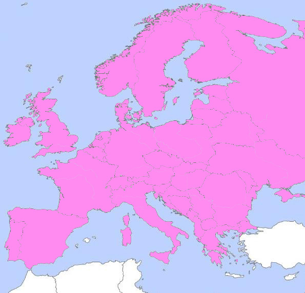 Распространение сурепки обыкновенной Barbarea vulgaris в странах Европы